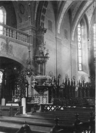 Проповідальниця. Бережани, парафіяльний костел